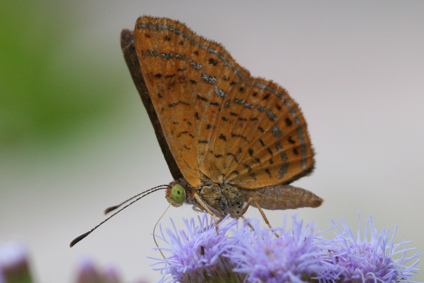 Calephelis nemesis